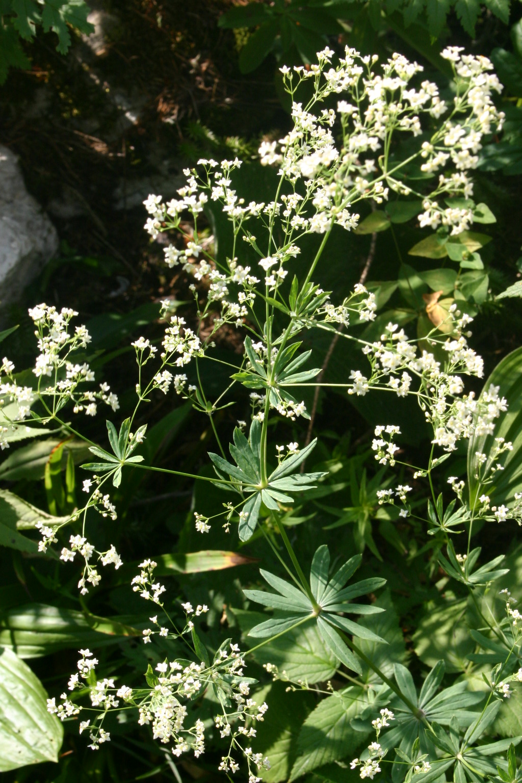 Galium sylvaticum (Wald-Labkraut) Aufnahmeort: bei Hollenstein an der Ybbs, Niederösterreich, Austria